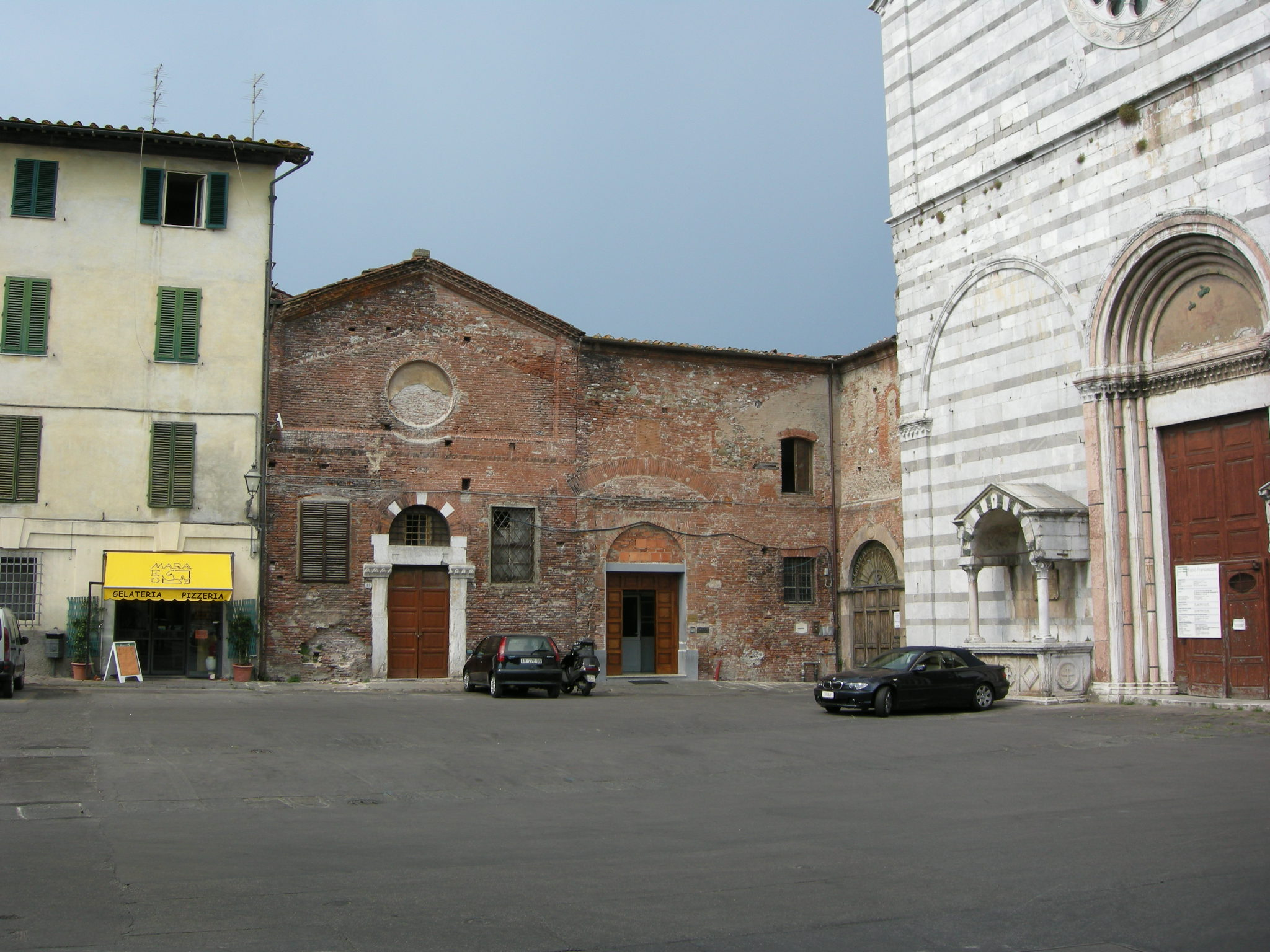 Lucca, san francesco 04 oratorio